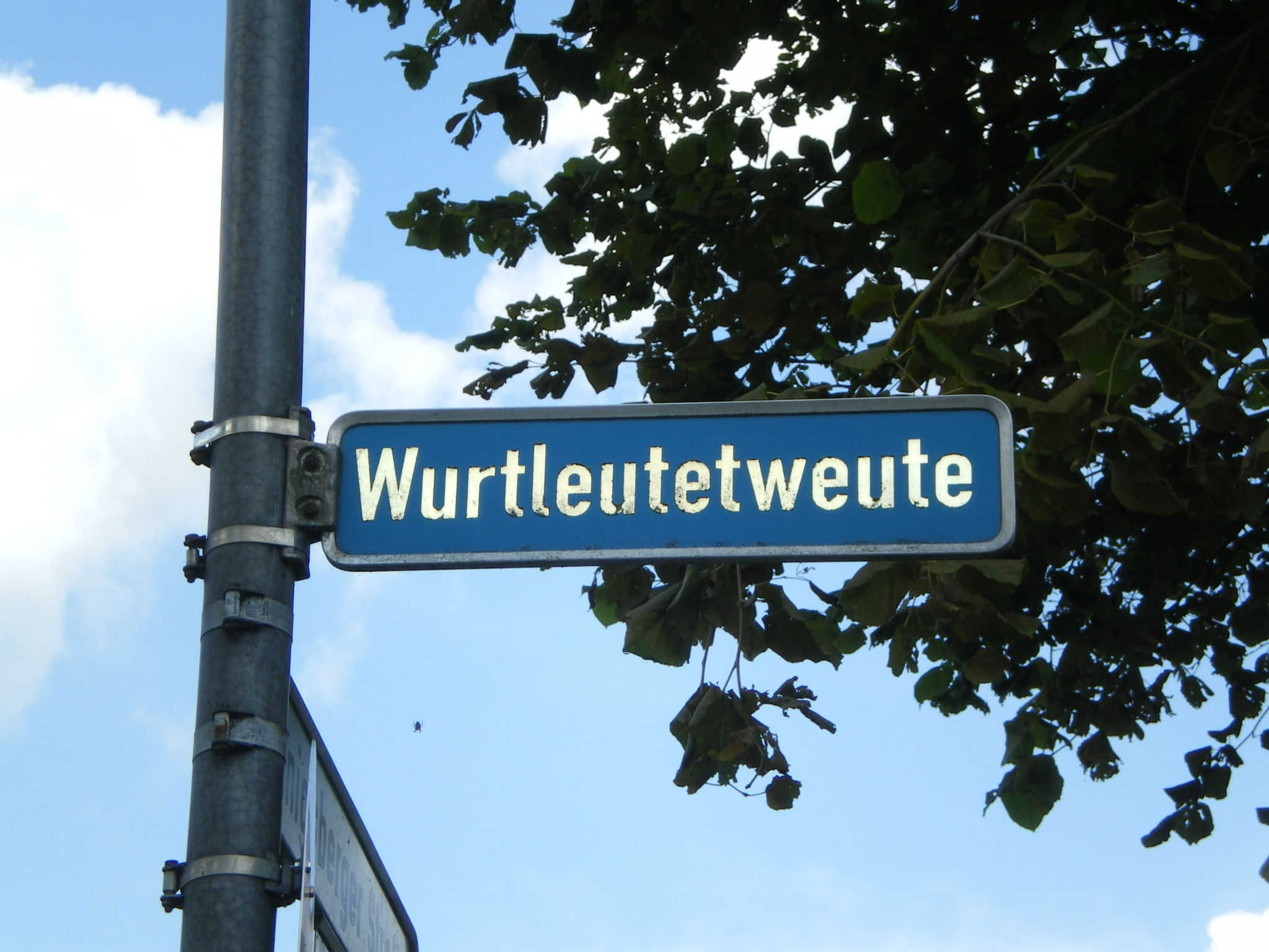 Straßenschild in Deutschland, 25541 Brunsbüttel, Wurtleutetweute / Ecke Königsberger Straße, Koordinaten: 53.903877°/9.445842°